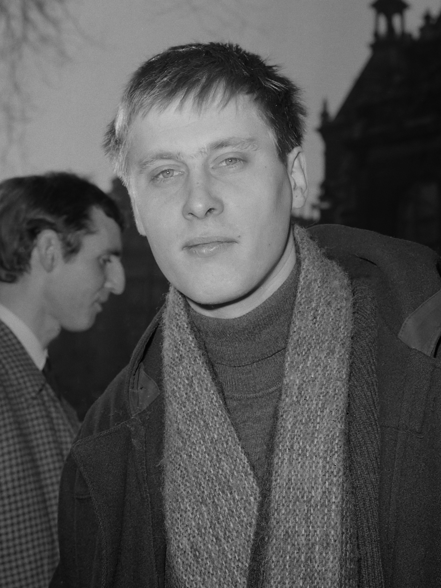 Drie cineasten op Leidseplein, Nikolai van der Heyde 2 februari 1965